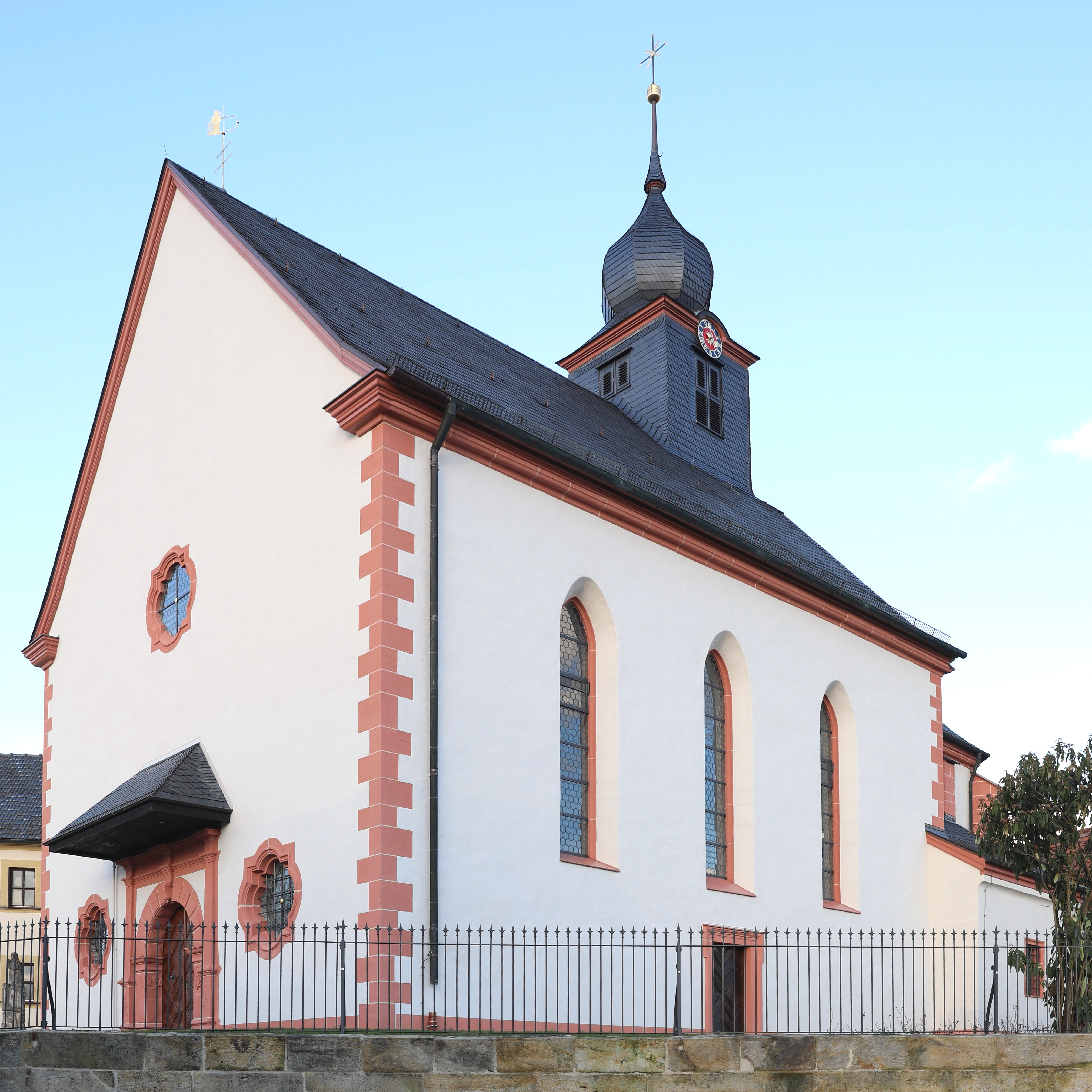 Altenbanz, St. Laurentius (Altenbanz)